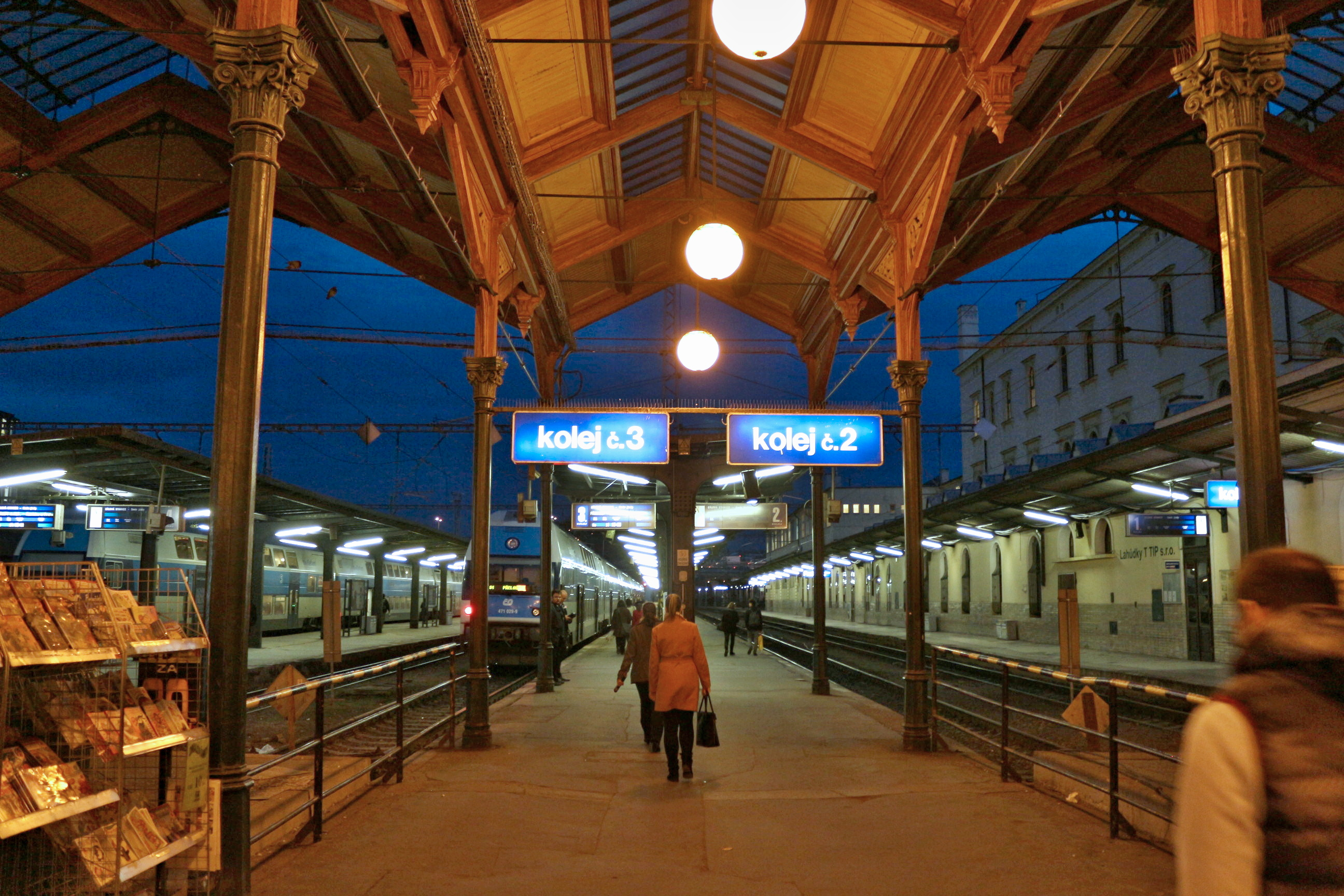 Interiéry Masarykova nádraží